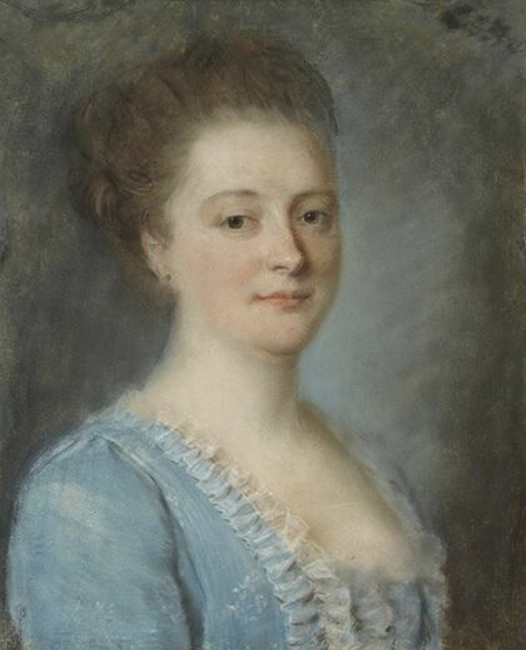 La comtesse des Réaux [?Mme Louis- Gabriel Taboureau des Réaux, née Amédée- Adélaïde Desnoyers de Lorme (c.1740– )]